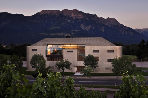 Die Reis Augenklinik in Bendern, Liechtenstein.